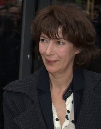 Anne Alvaro au déjeuner des César du cinéma